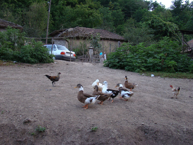 روستای كوته كومه